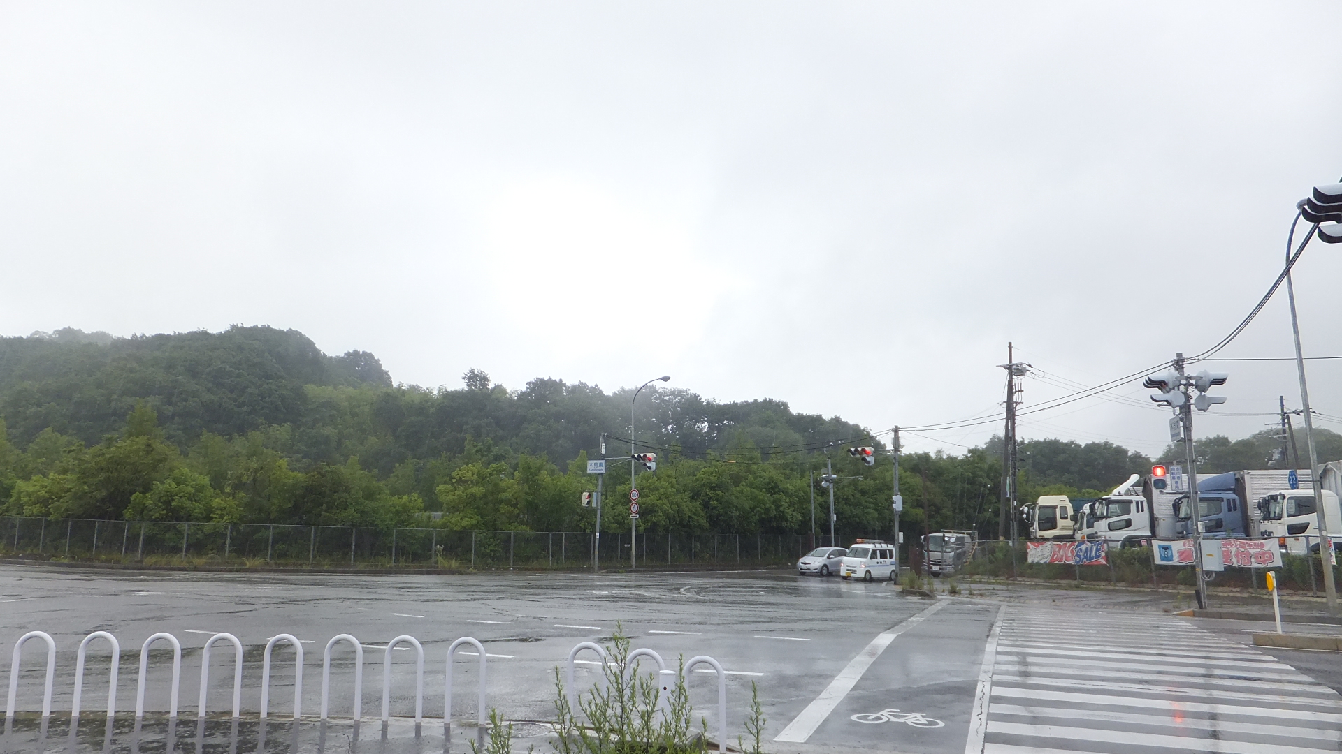 兵庫県神戸市西区押部谷町木見 兵庫県道52号小部明石線